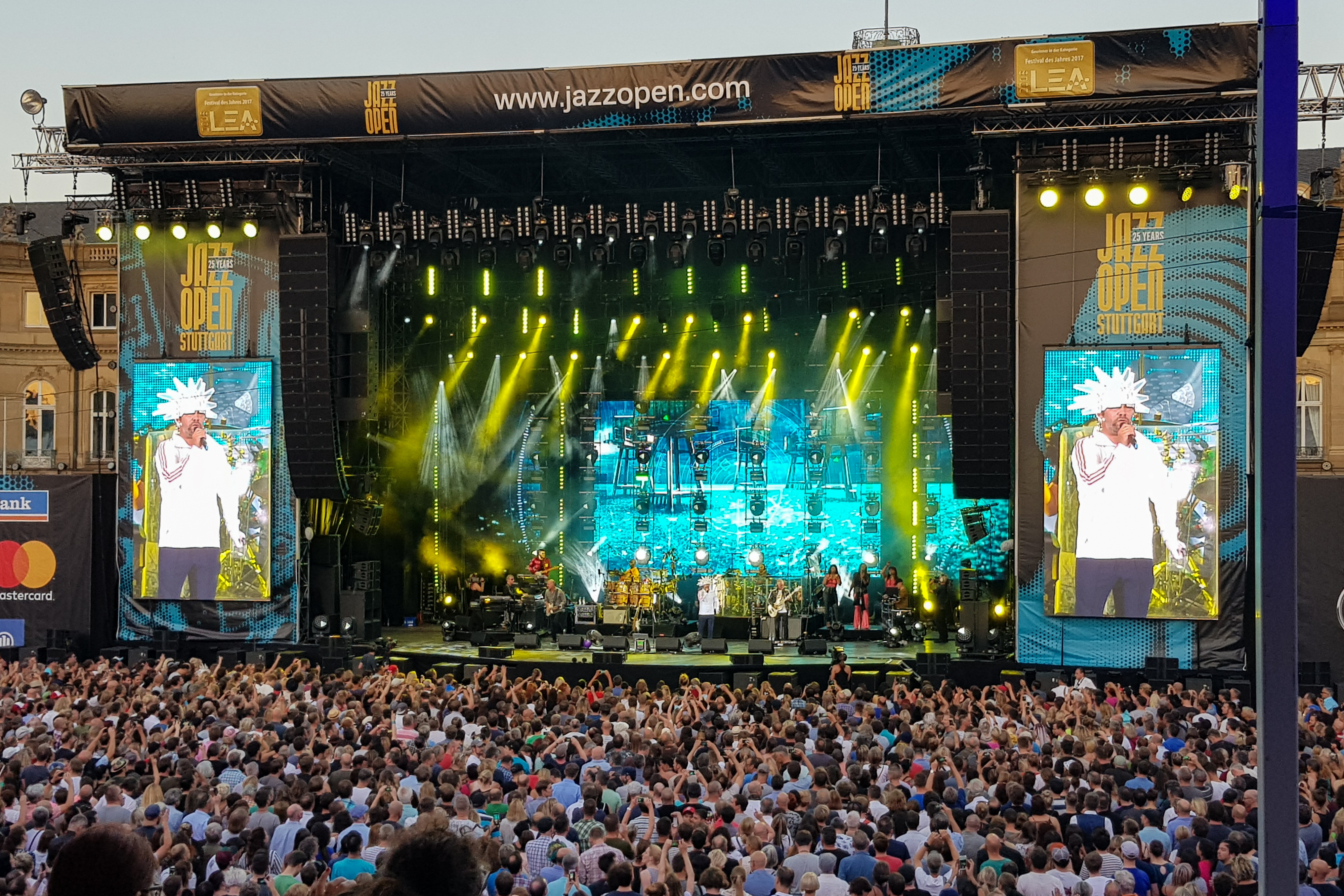 Jamiroquai bei den Jazzopen Stuttgart am 18. Juli 2018.